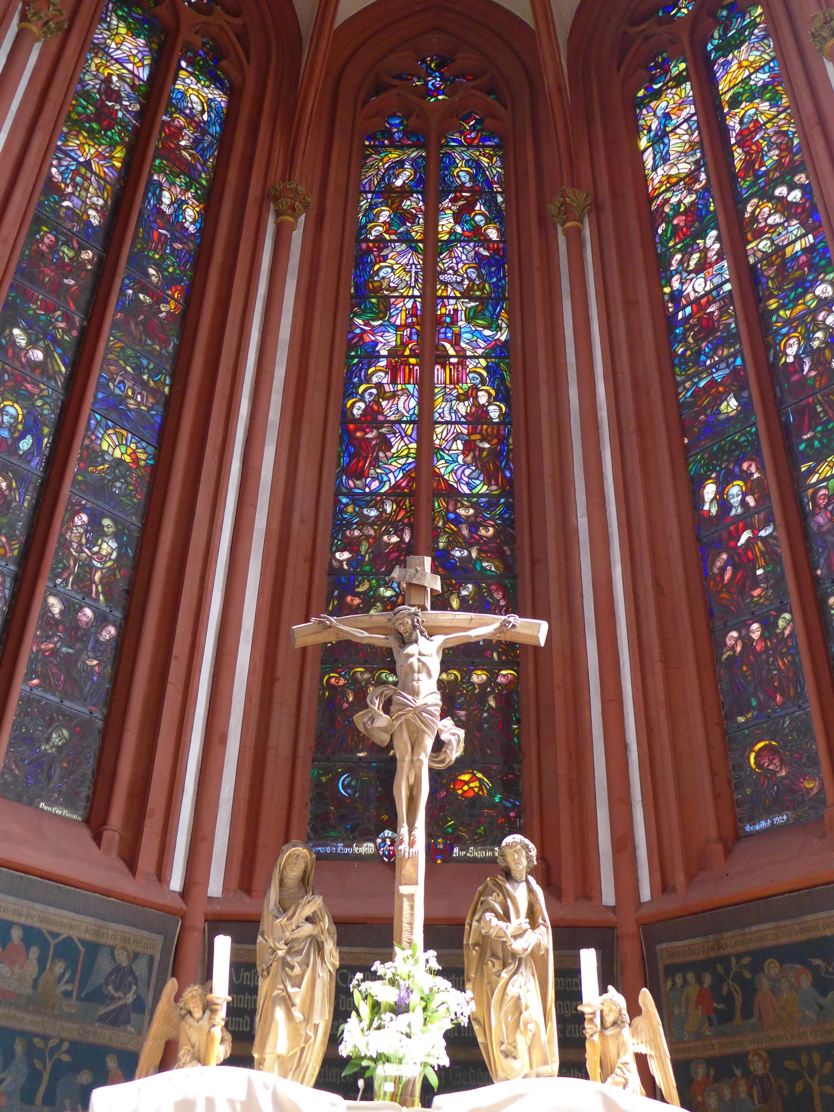 Würzburg, Deutschhauskirche, Apsisfenster von Elisabeth Cöster aus den Jahren 1924/1925 und Kreuzigungsgruppe des Würzburger Bildhauers Heinz Schiestl von 1929/30, Maria und Johannes sind Kopien von Tilman Riemenschneiders Kreuzgruppe in Aub